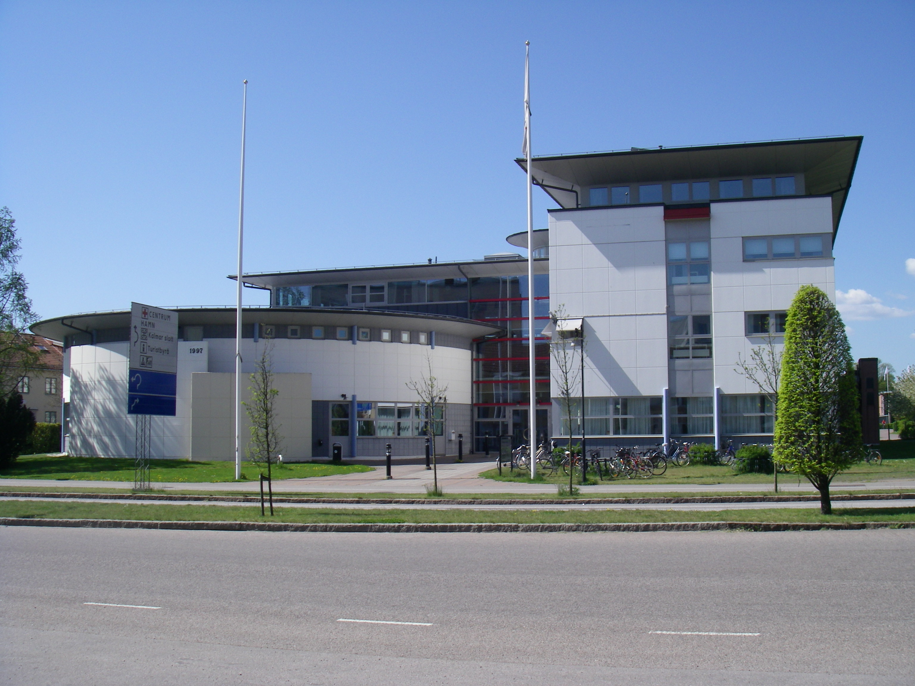 Kalmar University,Teknikum